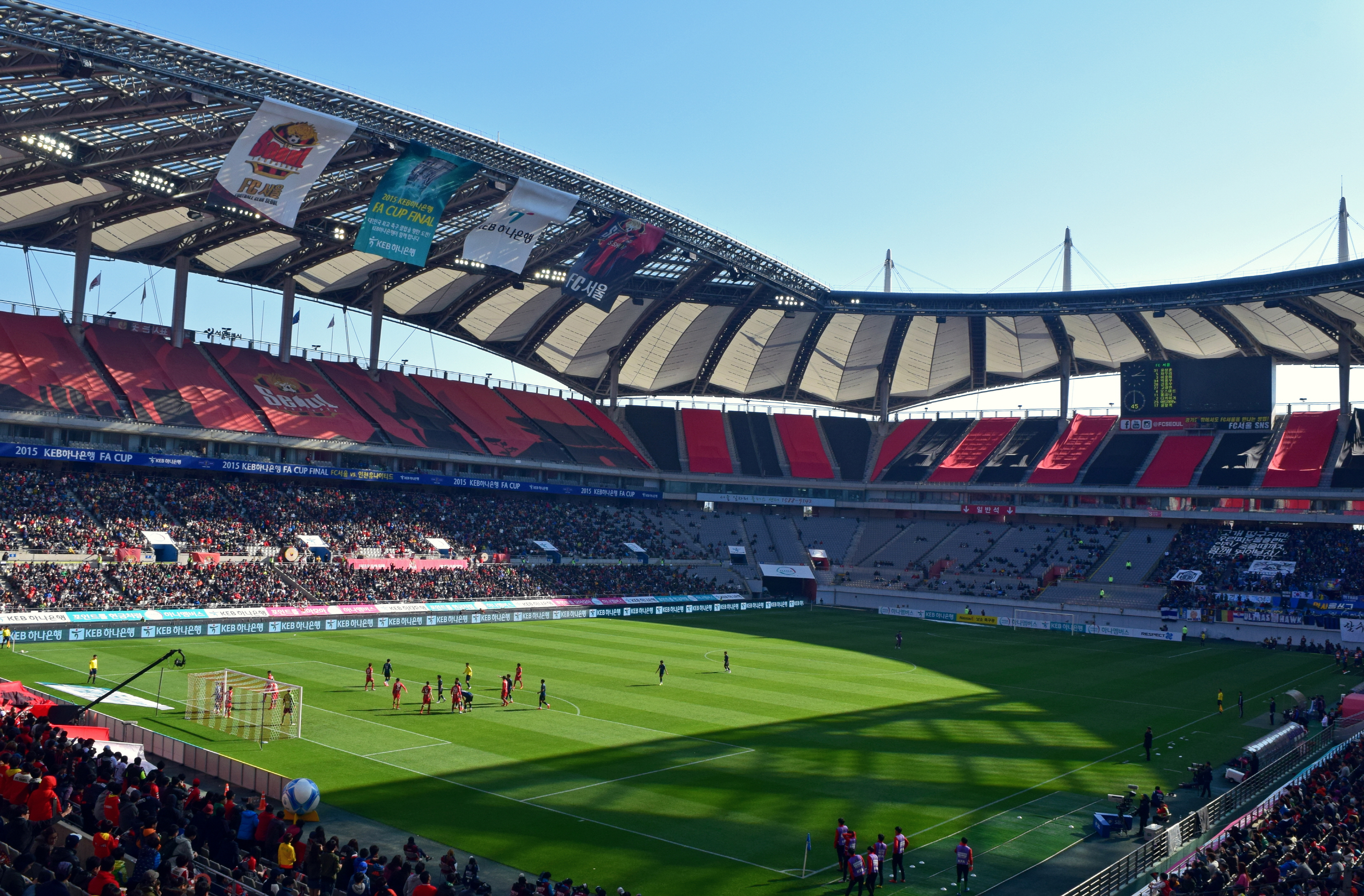 김다니엘,『하루쯤 축구여행』, 북카라반(2016)